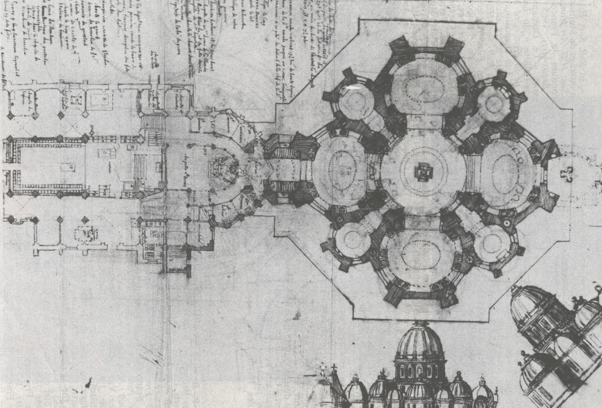 En 1665, Colbert demanda à François Mansart de concevoir un projet de chapelle funéraire des Bourbons. Commandée un an avant la mort de l'architecte, cette chapelle ne fut jamais édifiée. Son projet pour la chapelle des Bourbons aurait abouti à l'édification d'une vaste composition à plan central coiffée d'un dôme, à l'extrémité est de la basilique Saint-Denis qui en possédait déjà un, celui de la chapelle (inachevée) des Valois. Un certain nombre de chapelles à dôme, pour abriter les tombeaux, se seraient groupées autour de cet espace central circulaire qui devait être recouvert d'un dôme tronqué complexe, éclairé à l'intérieur par des fenêtres invisibles. Jules Hardouin-Mansart qui fut formé tout jeune par son grand-oncle, s'inspira souvent des de dessins de celui-ci. En particulier, le plan de Hardouin pour la chapelle à dôme des Invalides doit beaucoup au projet non exécuté de Mansart pour une chapelle des Bourbons à la basilique Saint-Denis.